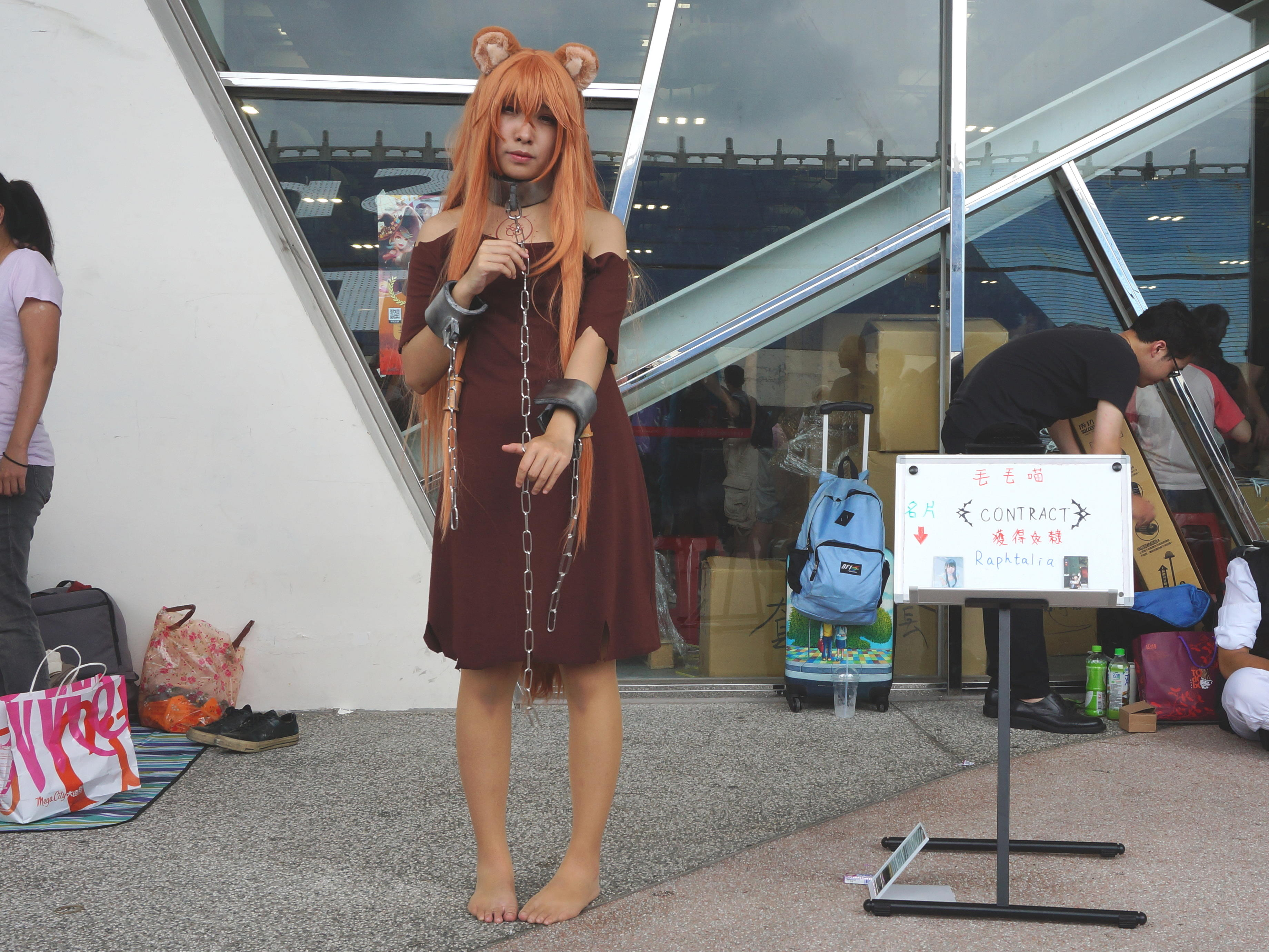 中文（台灣）: 第30屆亞洲動漫創作展，毛毛喵cosplay《盾之勇者成名錄》拉芙塔莉雅。